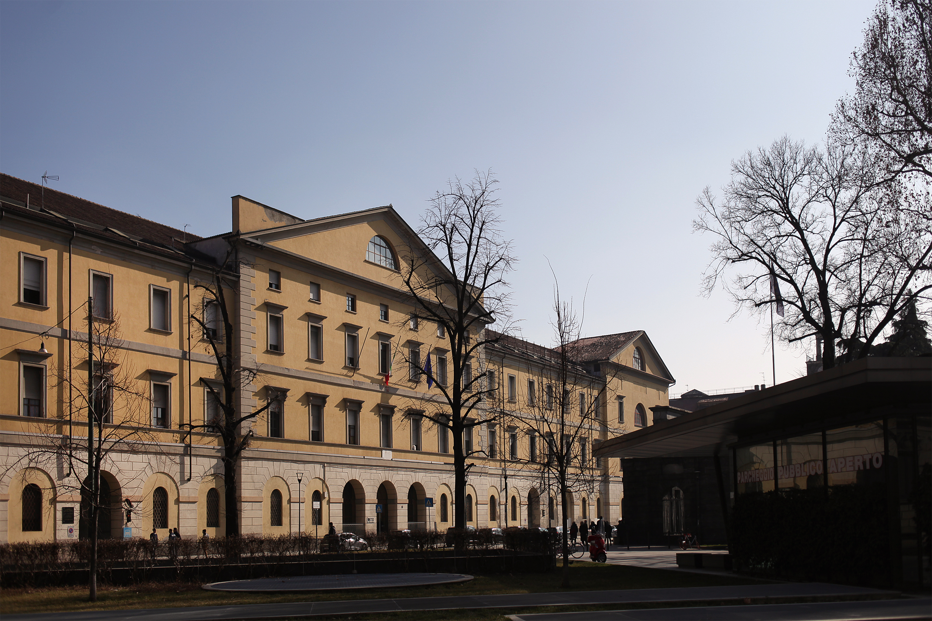 Caserma Garibaldi, Milano, sede della Polizia di Stato, Milano, veduta laterale